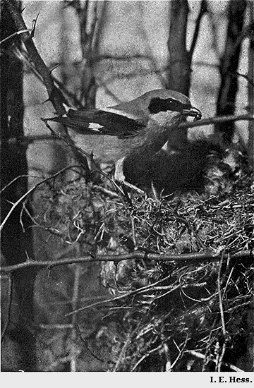 Loggerhead Shrike and nest.